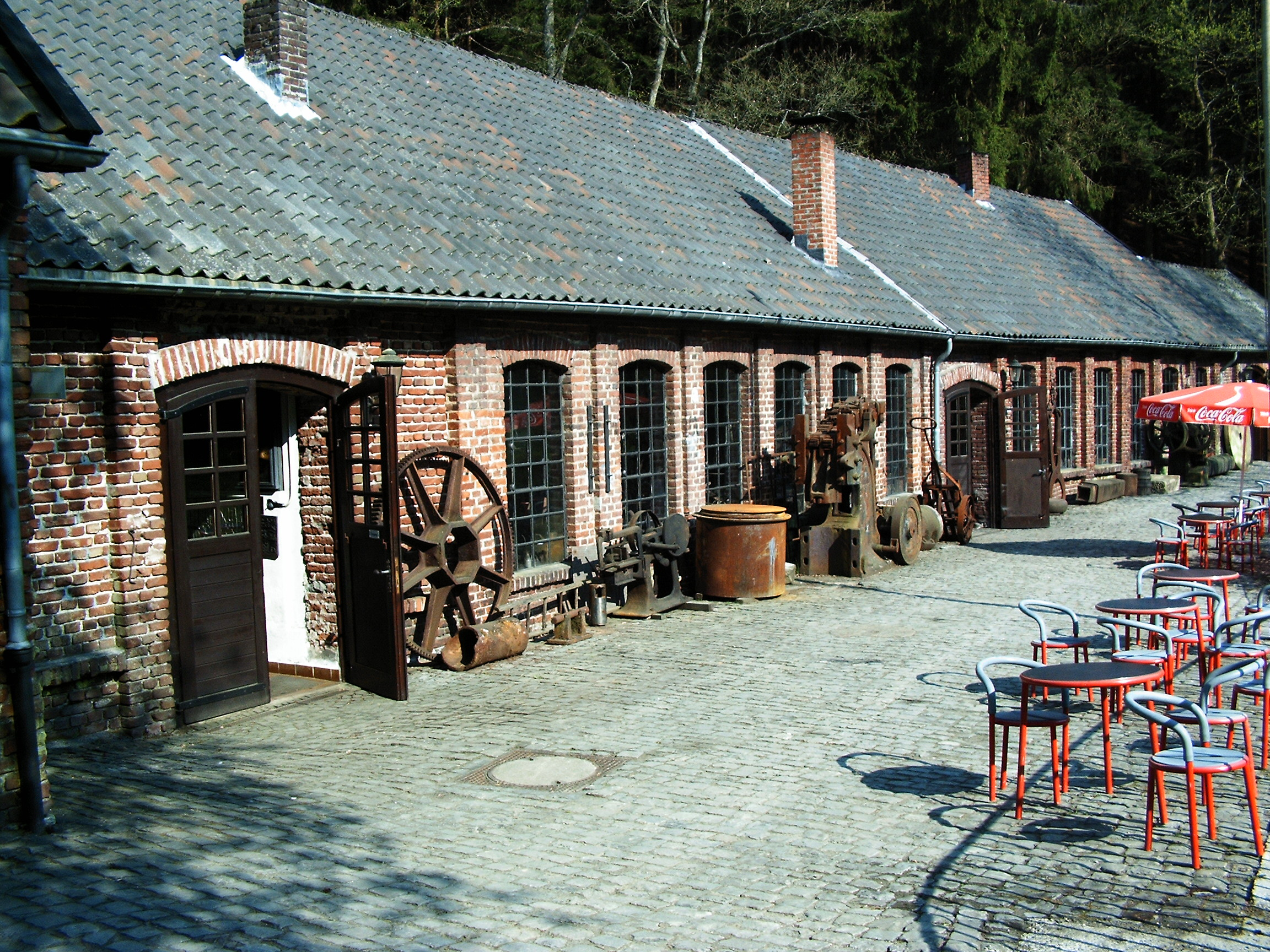 Bremecker Hammer in Lüdenscheid (Deutschland)